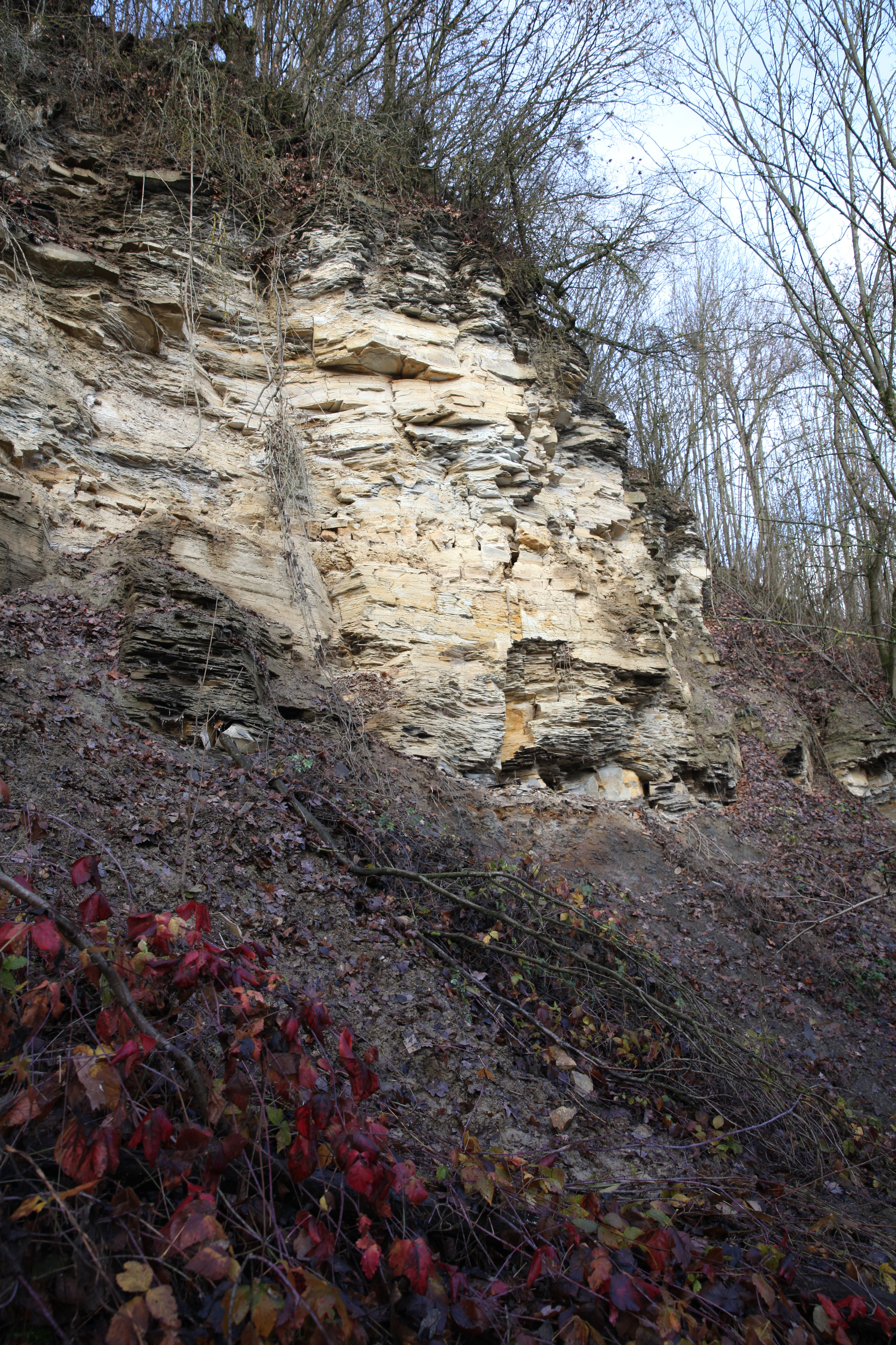 Nedensdorf Trimeusel